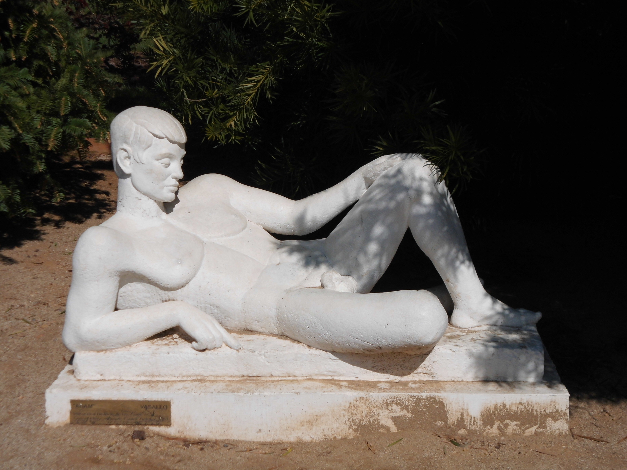 Adam (Jacinto Bustos Vasallo). Parc de Cervantes (Barcelona)